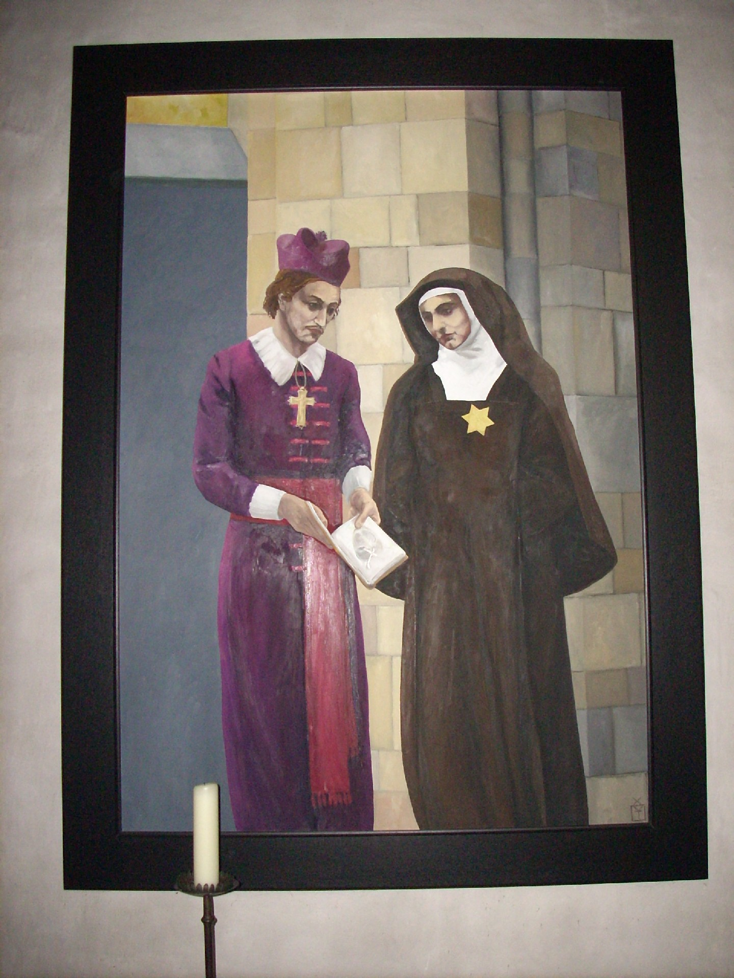 St. Ludgeri Münster, Niels Stensen und Edith Stein